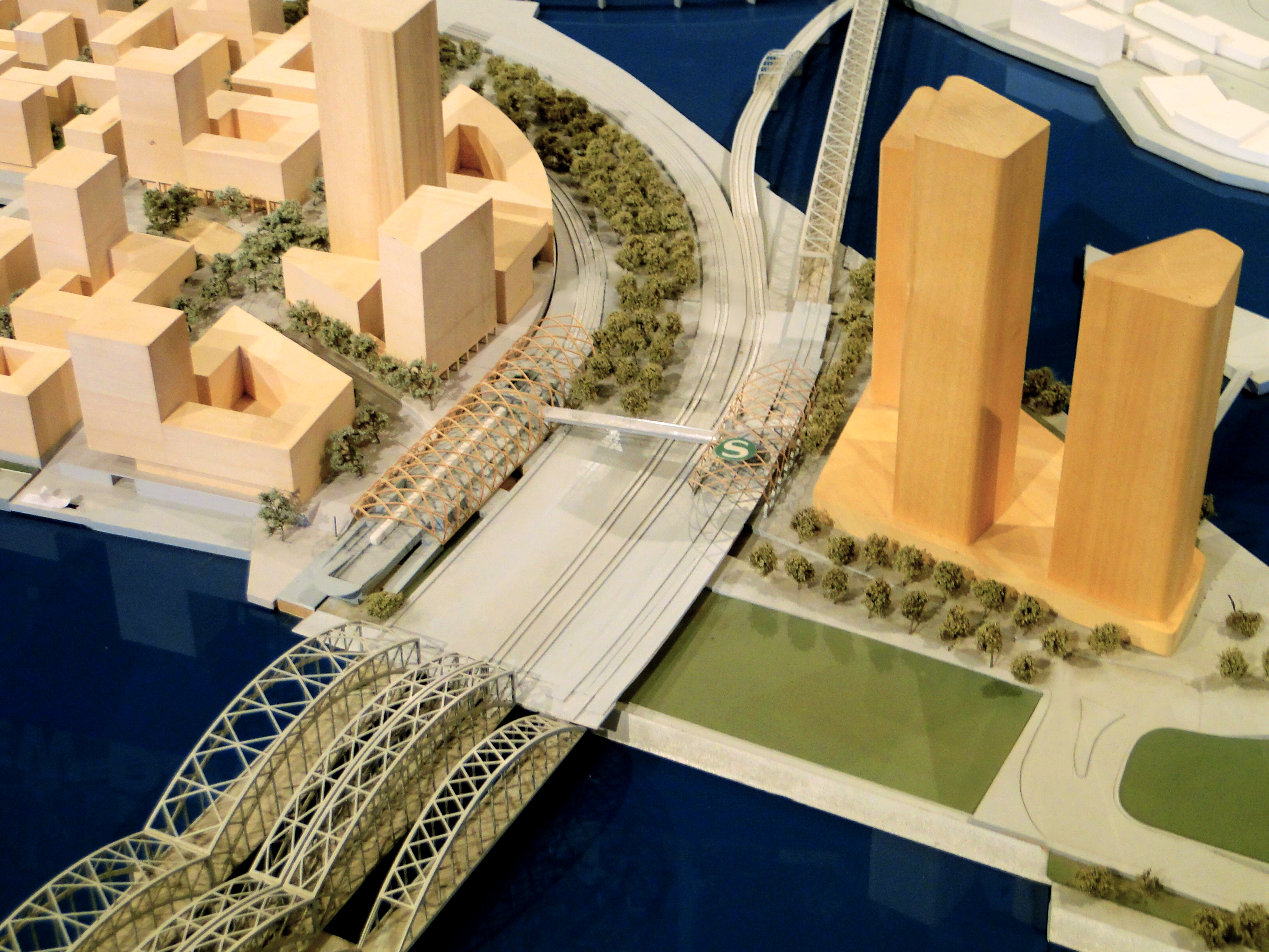 Modell des Quartiers Elbbrücken in der HafenCity. Im Vordergrund die geplante U- und S-Bahnhaltestelle Elbbrücken.